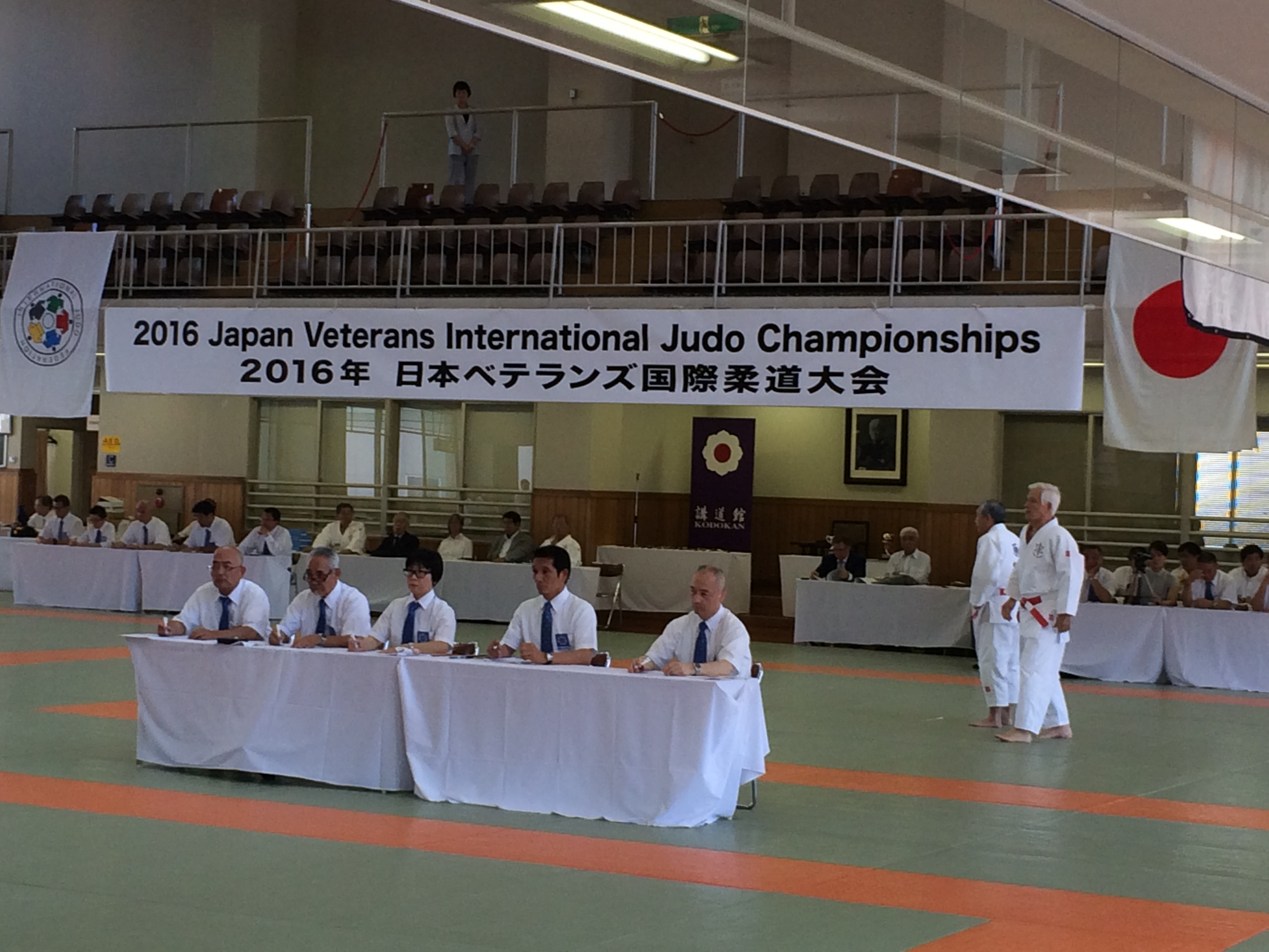 Judging kata